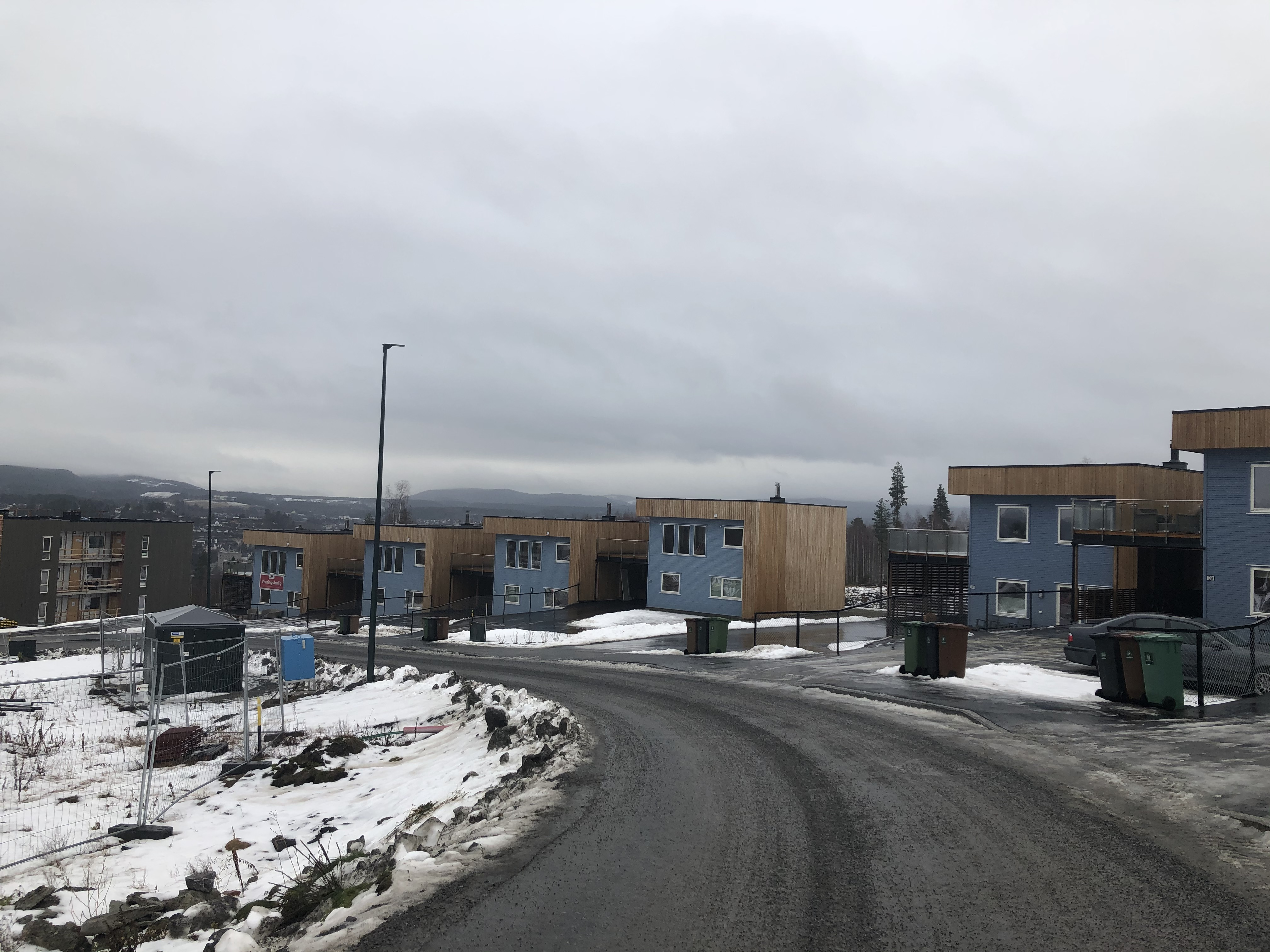 Tanbergstubben, Hønefoss